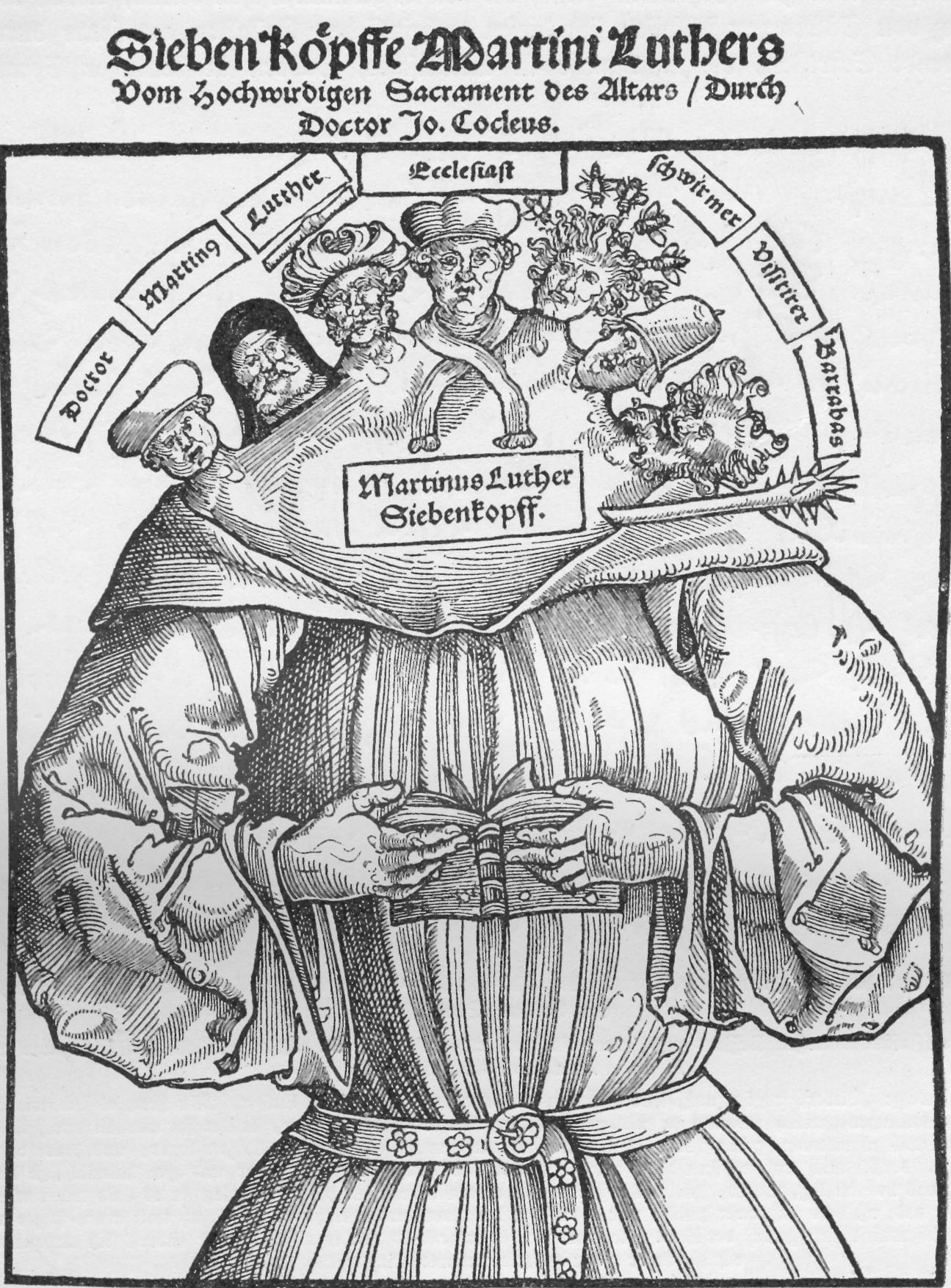 Flugblatt gegen Luther als siebenköpfiges Monster